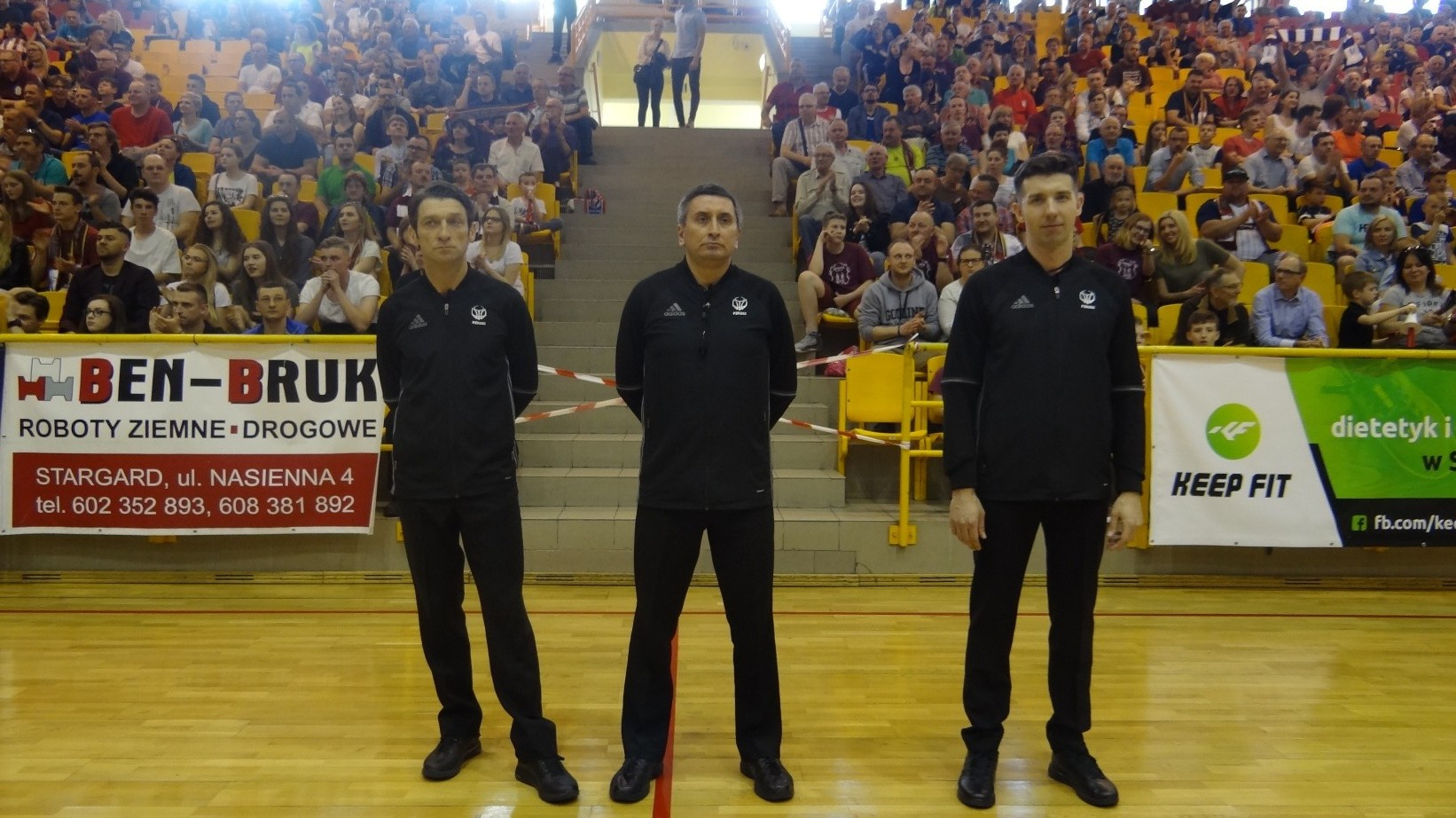 Sędziowie meczu Spojnia-GKS Tychy, 28.04.2018